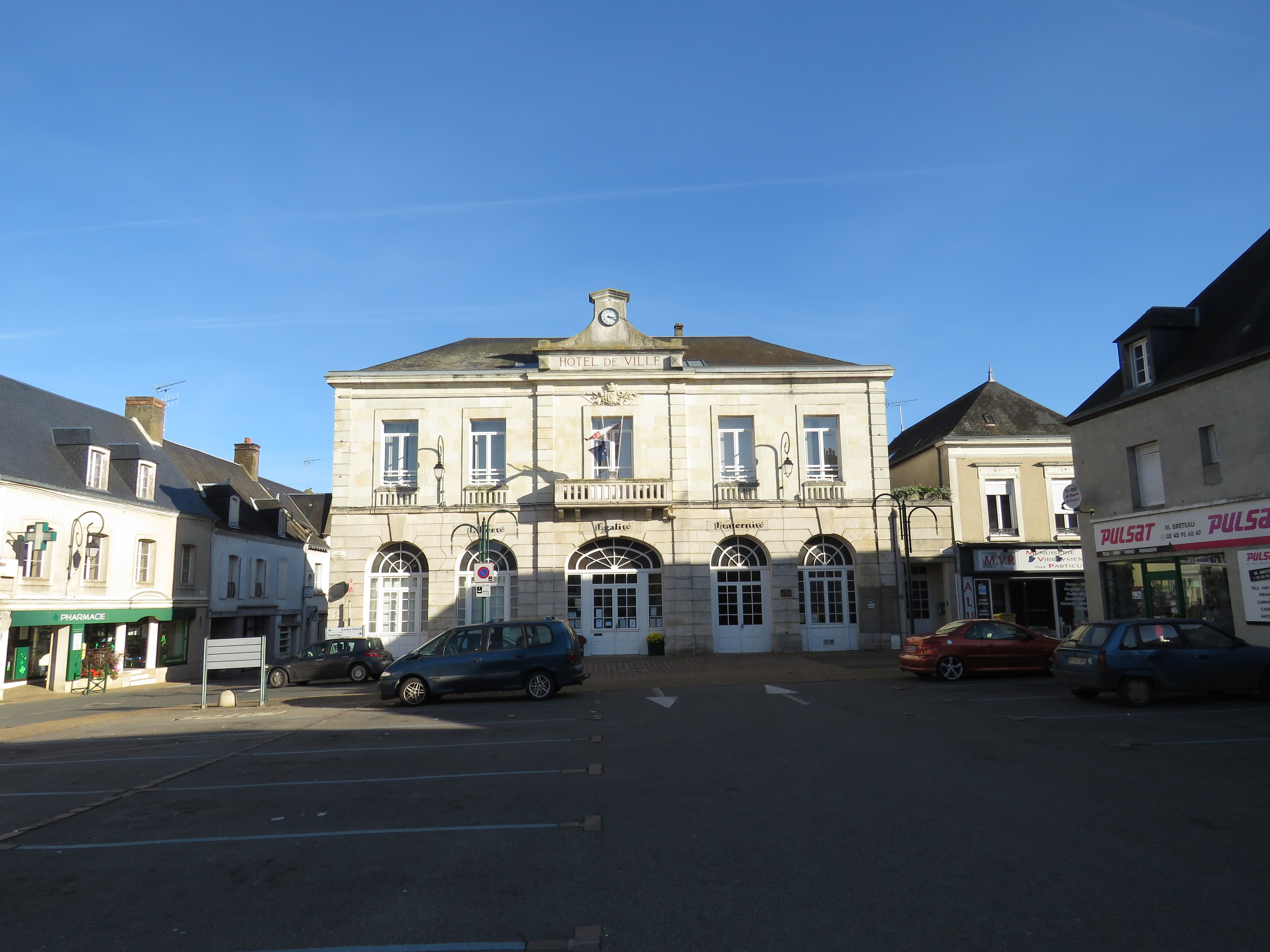 mairie